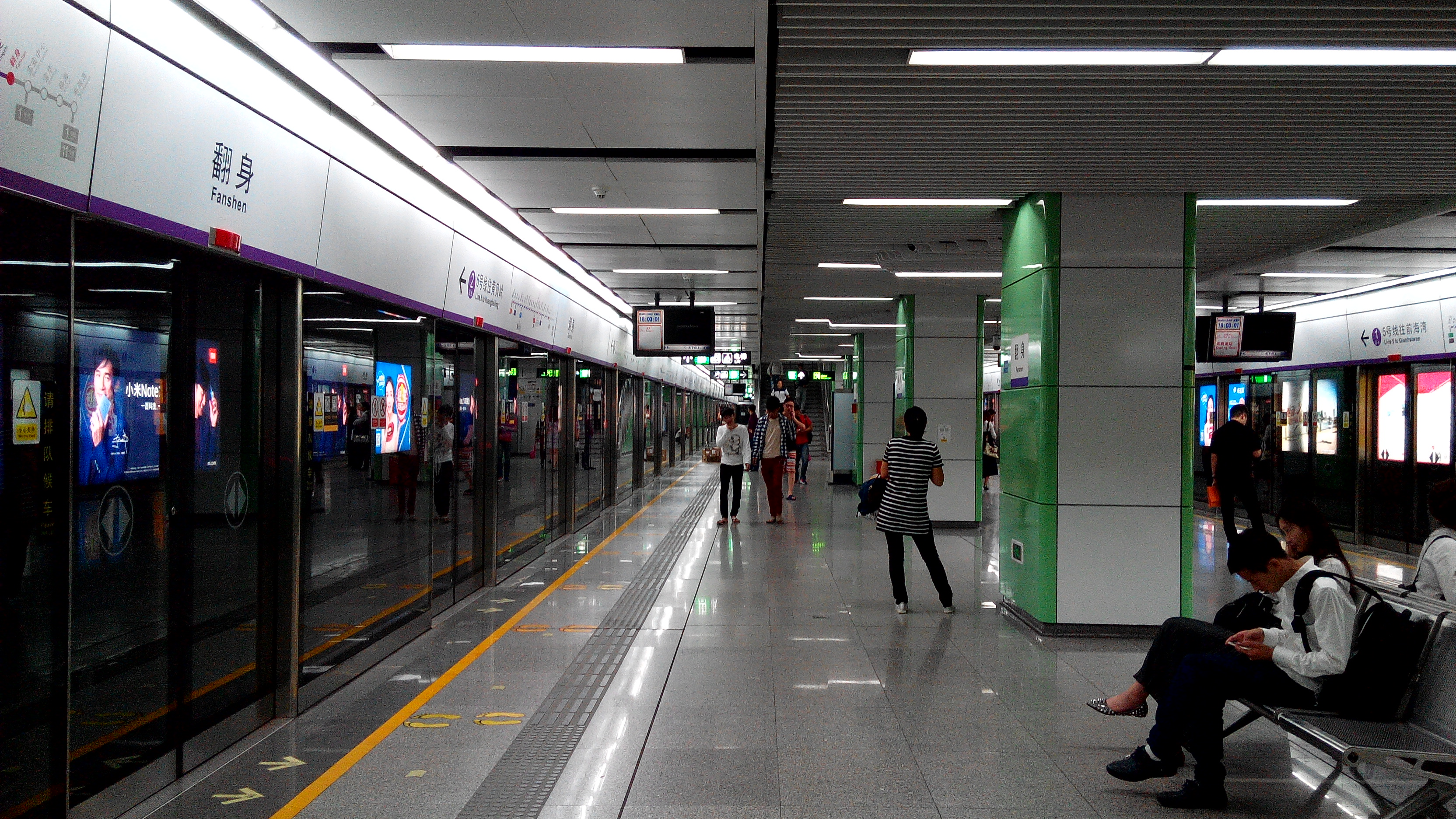 深圳地铁5号线翻身站站台